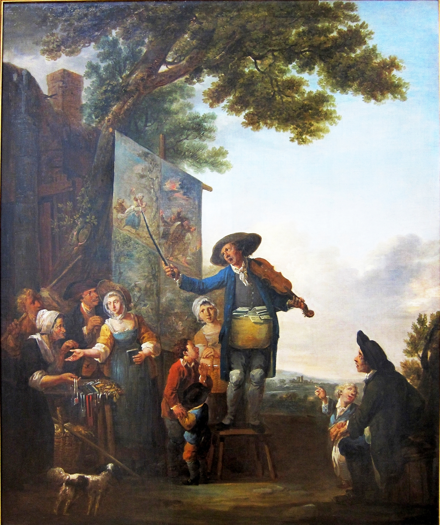 Le violoneux (Palais des Beaux-Arts de Lille).